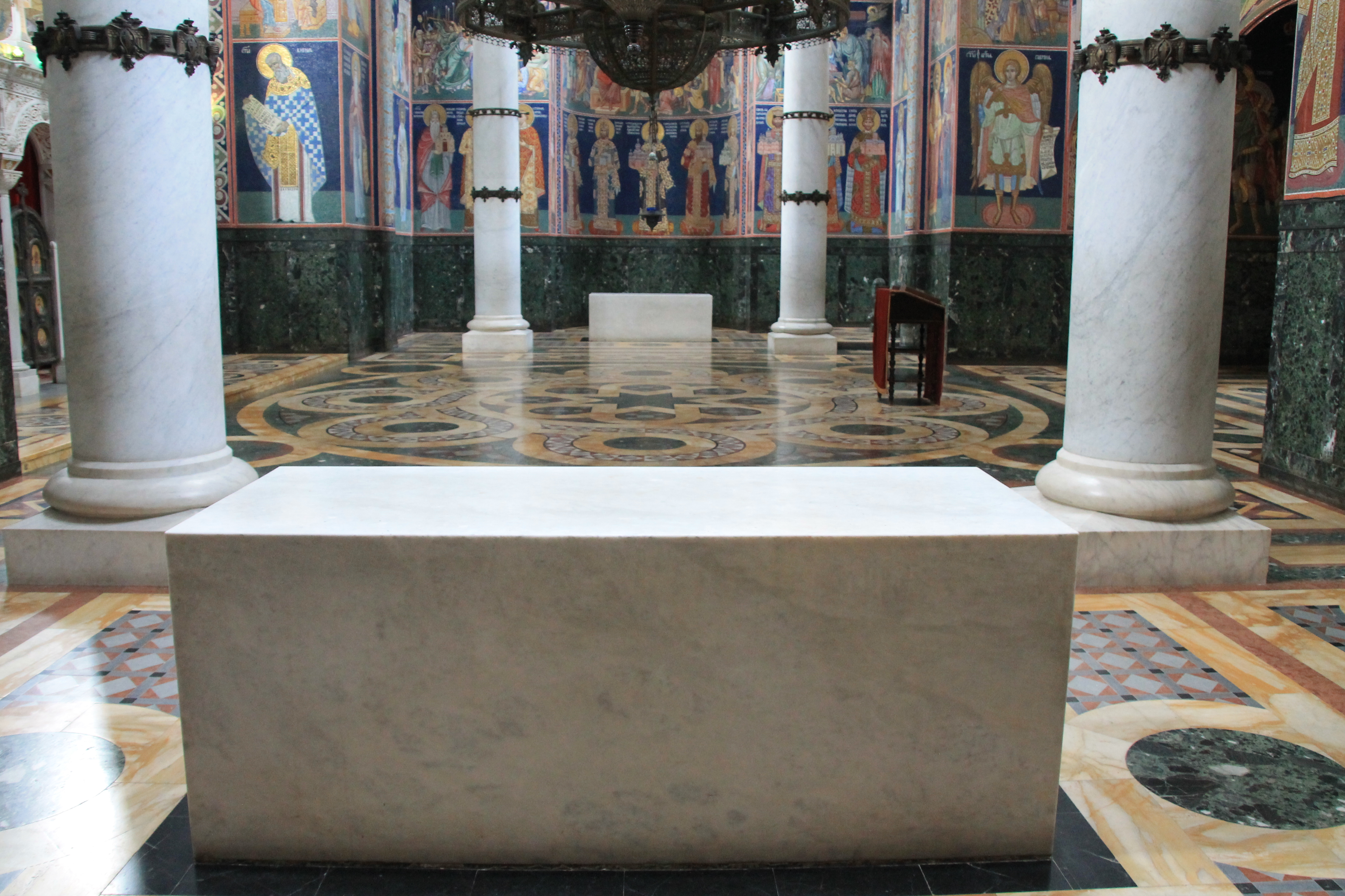 Crkva mauzolej na Oplencu